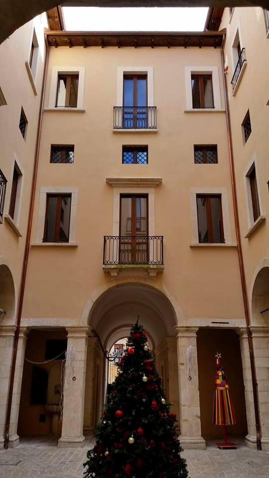 Interno di Palazzo Cappa Cappelli in L'Aquila.